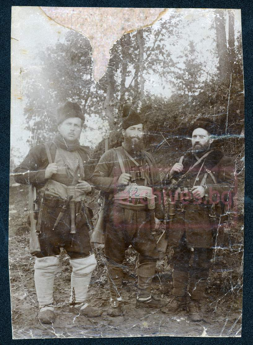 Тачо Хаджистоенчев (в средата).